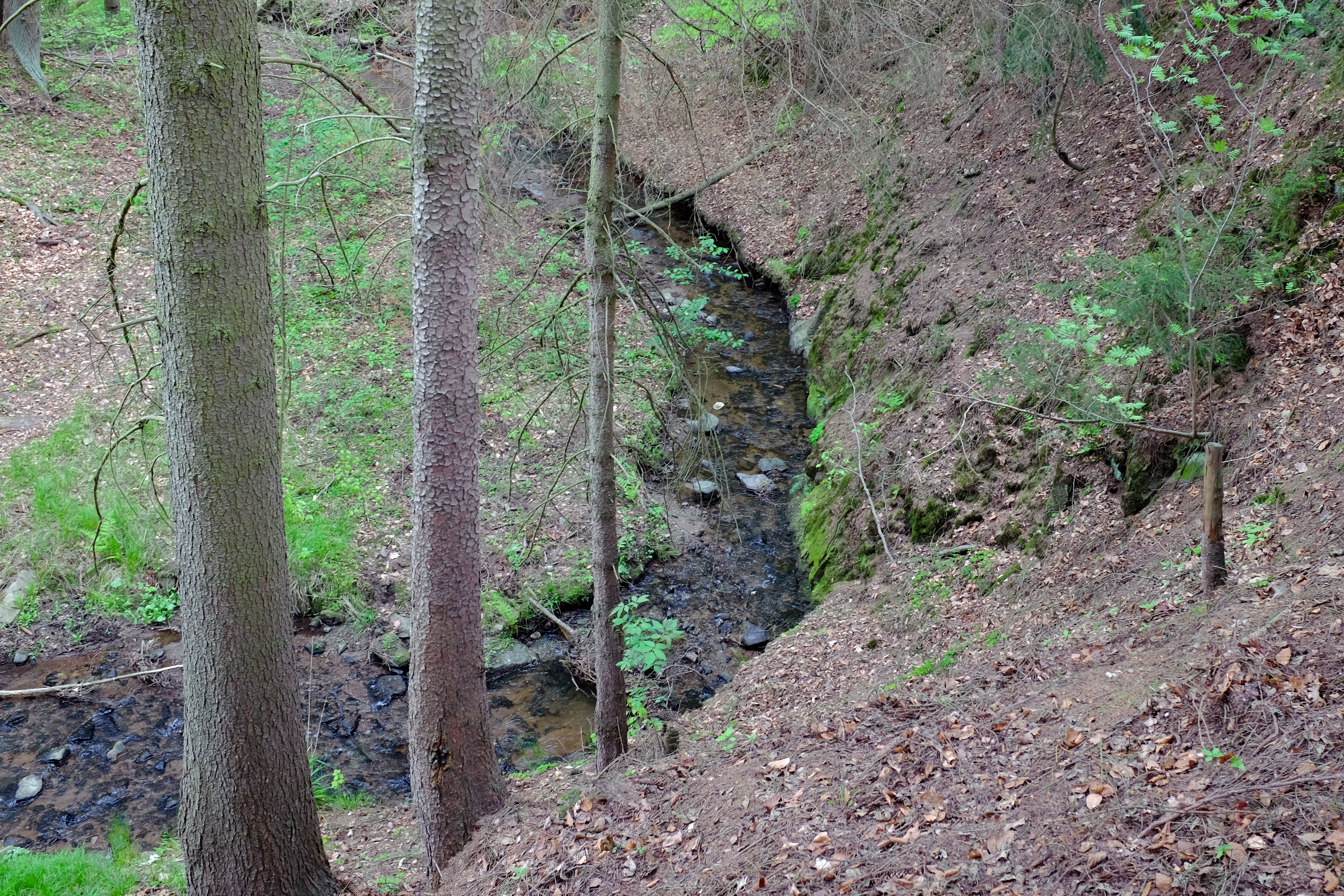 Potok Hloubek, přítok Ohře u Sedlečka, okres Karlovy Vary